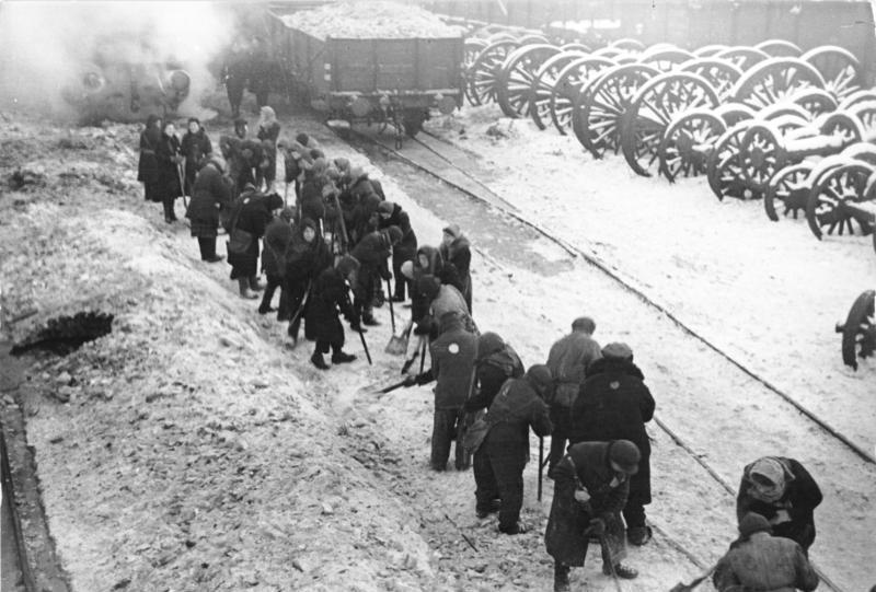 ADN-ZB/Donath II. Weltkrieg 1939 - 1945 Judenverfolgung durch die deutschen faschistischen Besatzungstruppen in der Sowjetunion (Beloruss. SSR) Jüdische Bürger von Minsk beim Schneeräumen auf dem Bahnhof. Aufn. Februar 1942 Information added by Wikimedia users.